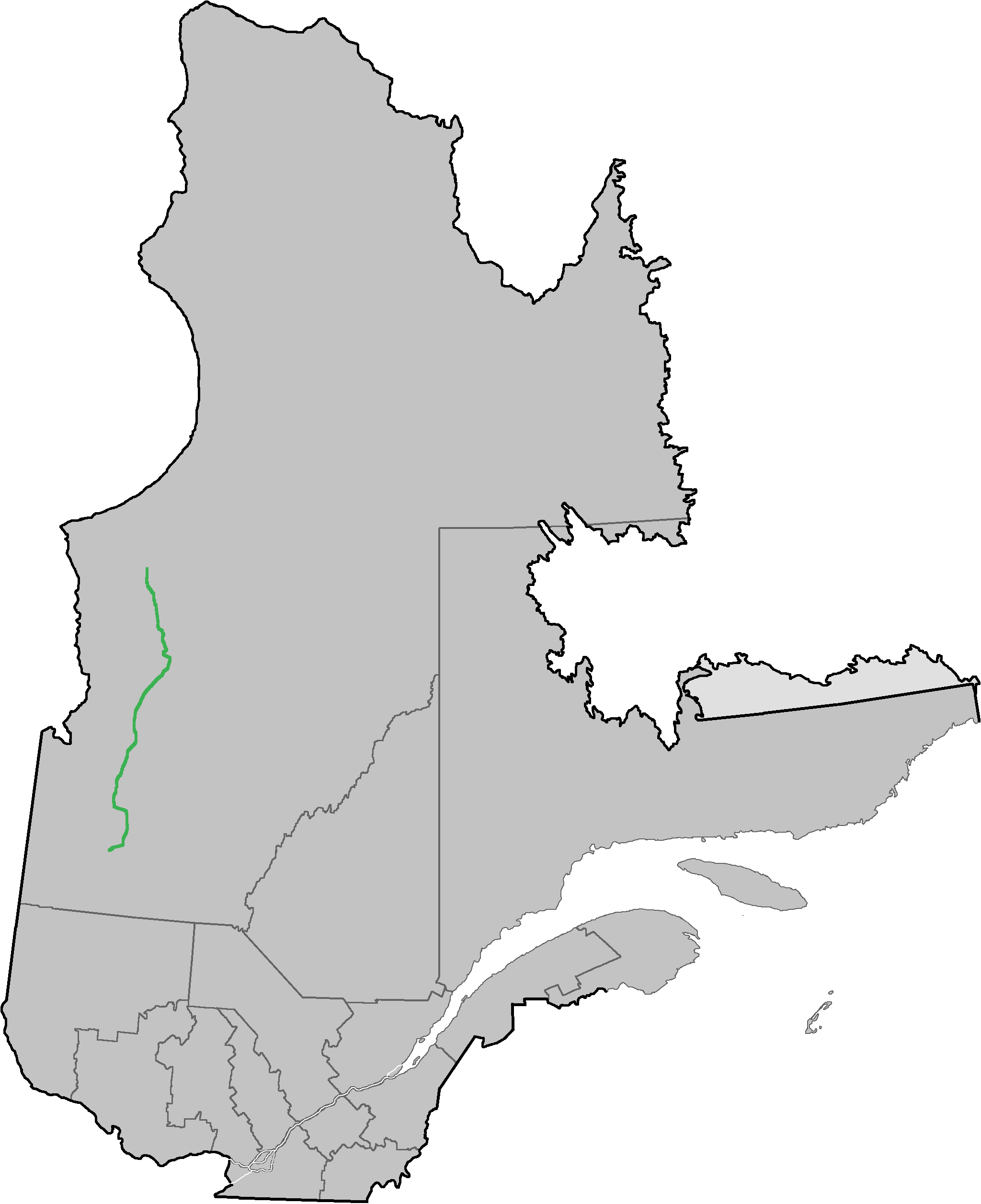 Carte de la route québécoise au Nord-du-Québéc